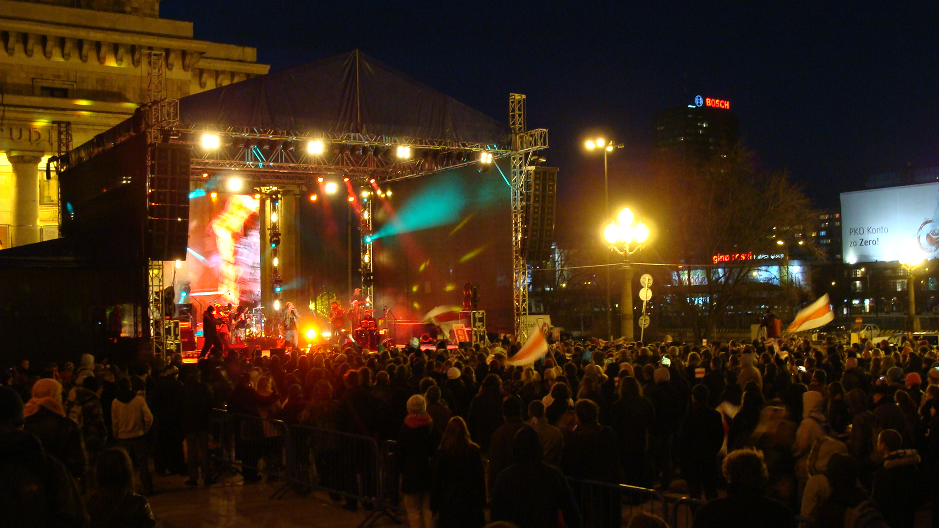 Koncert "Solidarni z Białorusią" 27 marca 2011 roku na placu Defilad w Warszawie.